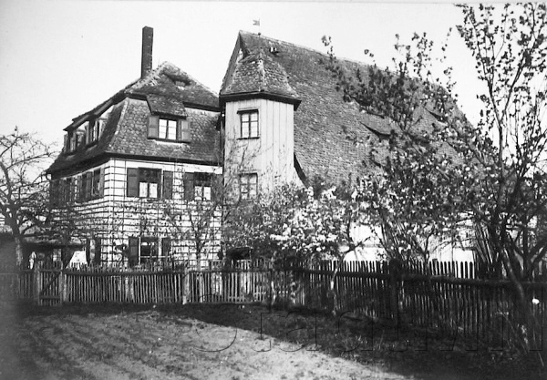 Schloss Heuchling, Lauf an der Pegnitz, Landkreis Nürnberger Land